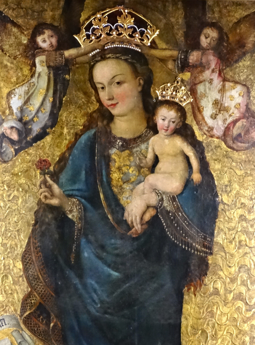 Obraz Matki Bożej Pięknej Miłości w ołtarzu głównym katedry bydgoskiej; "Madonna Bydgoska" (XV w.), dwukrotnie koronowany (1966, 1999)